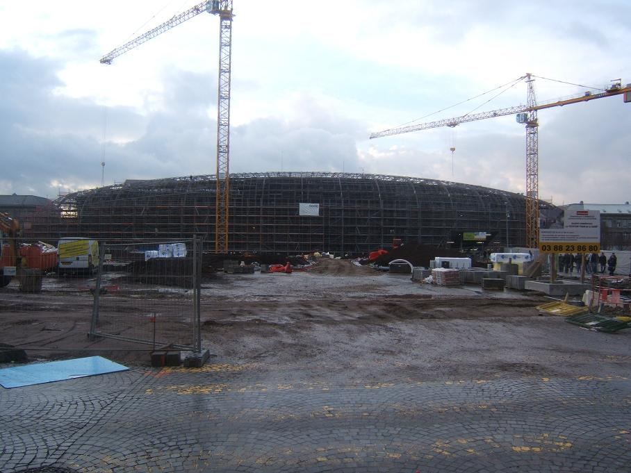 (en) Workings ahead Strasbourg's railway station (march 2007)(fr) Travaux devant la gare de Strasbourg en mars 2007